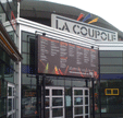 Accueil Scène nationale de Sénart, La Coupole, Combs-la-Ville